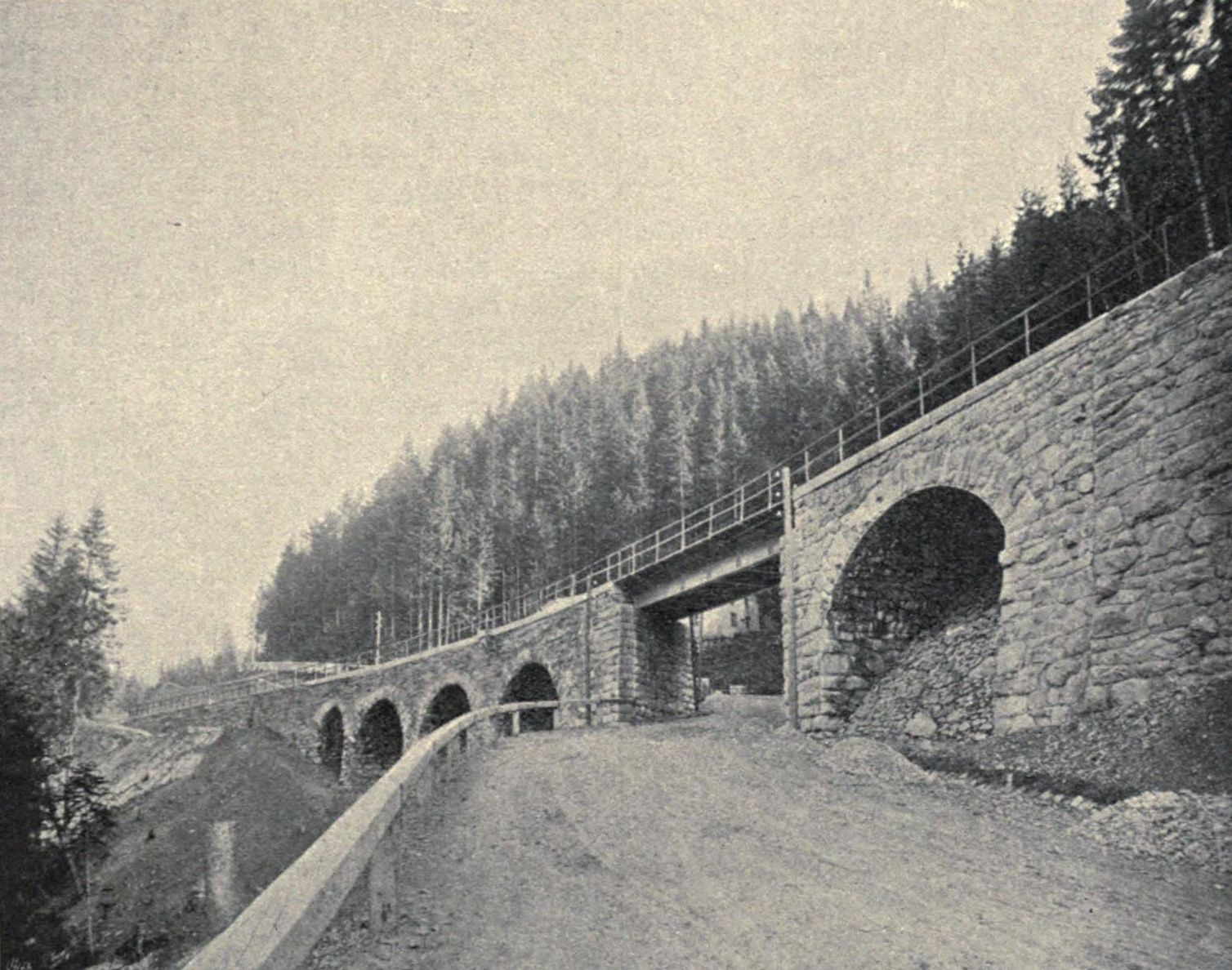 Abb. 207. Weinzettelgraben-Partie. [Eisenerz-Vordernberg.]